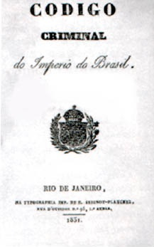 Foto da página de um exemplar do Código Criminal do Brasil, de 1830.